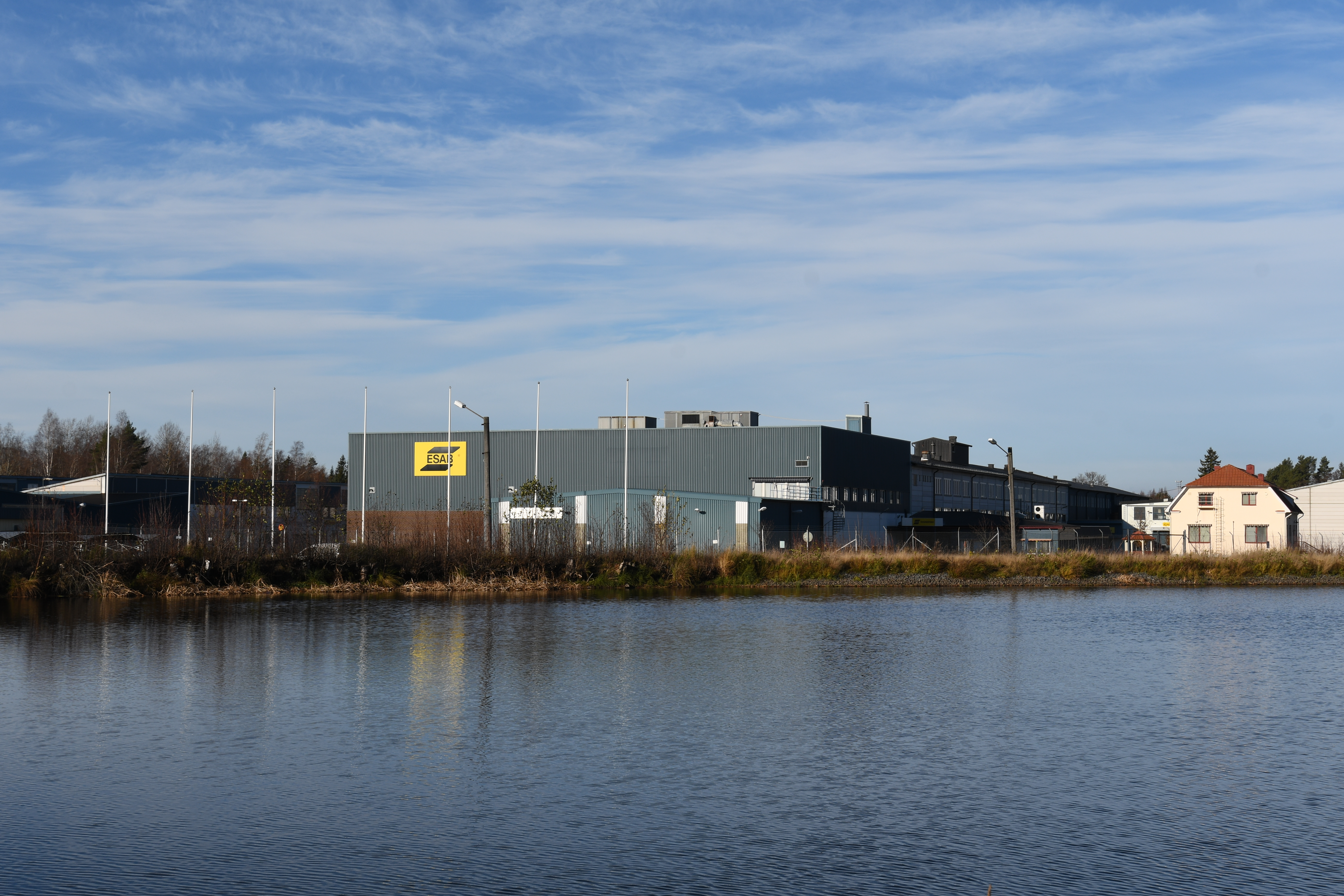 Laxå, november 2018.